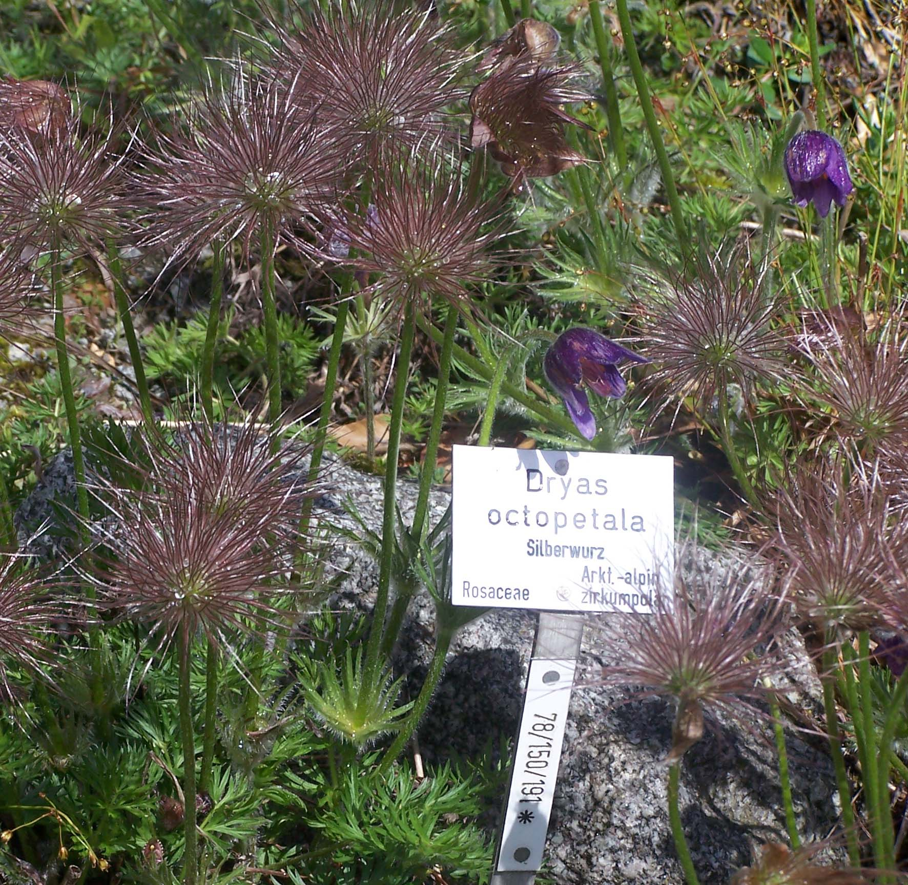 Blühpflanzenporträt Gewöhnliche Kuhschelle (Pulsatilla vulgaris) im Botanischen Garten Marburg – keine Silberwurz, wie es auf dem Schild steht